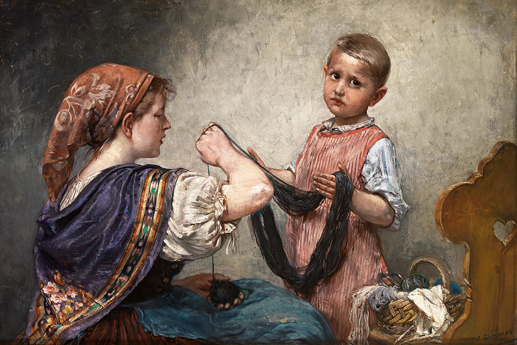 Knabe hilft der Mutter beim Wolle aufwickeln. Öl/Lwd. 85 × 126 cm. Signiert und 1914 datiert. Rückseitig Klebezettel, betitelt 'In Kriegszeiten'.